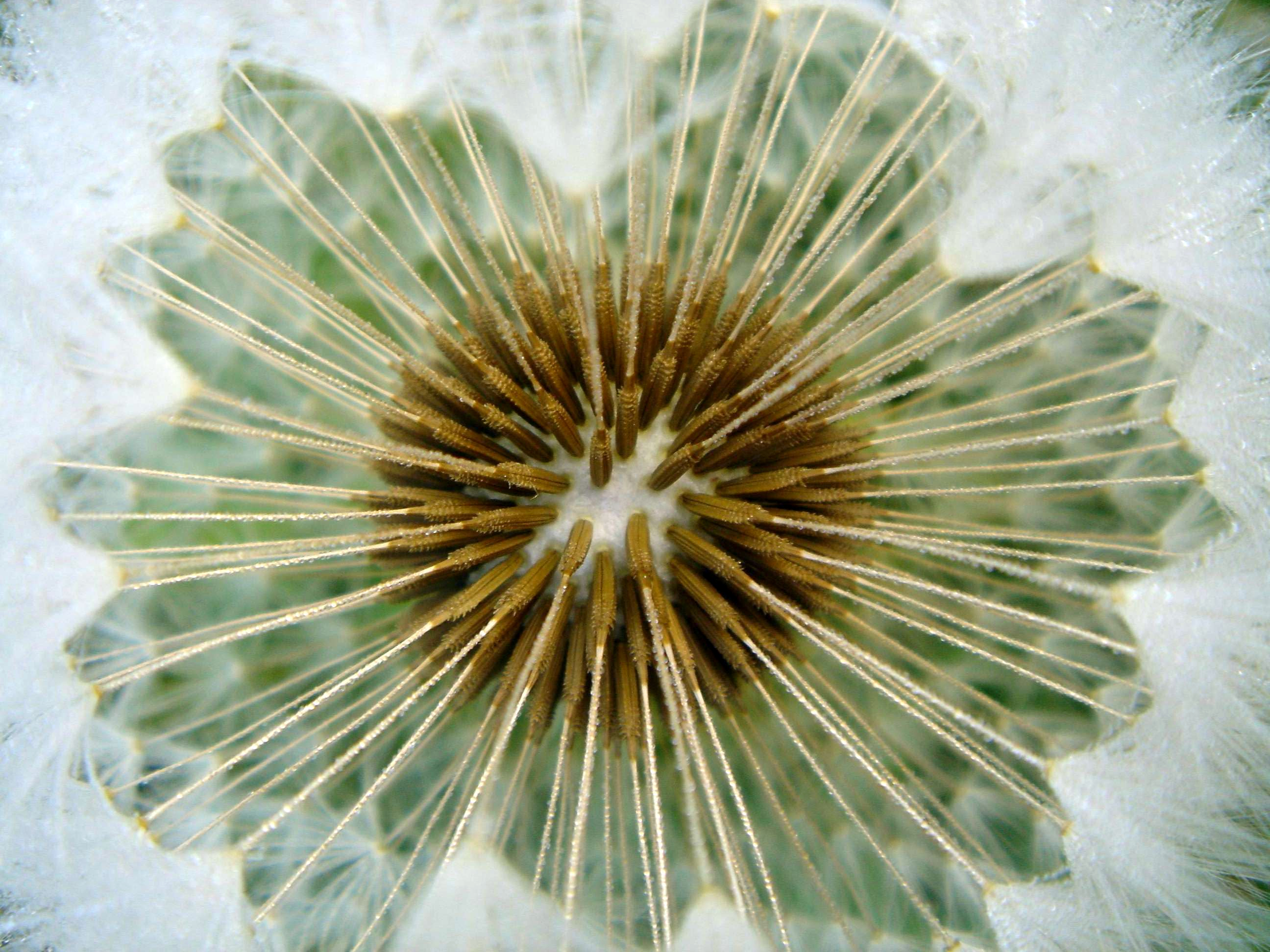 Gyermekláncfű magja (Románia)